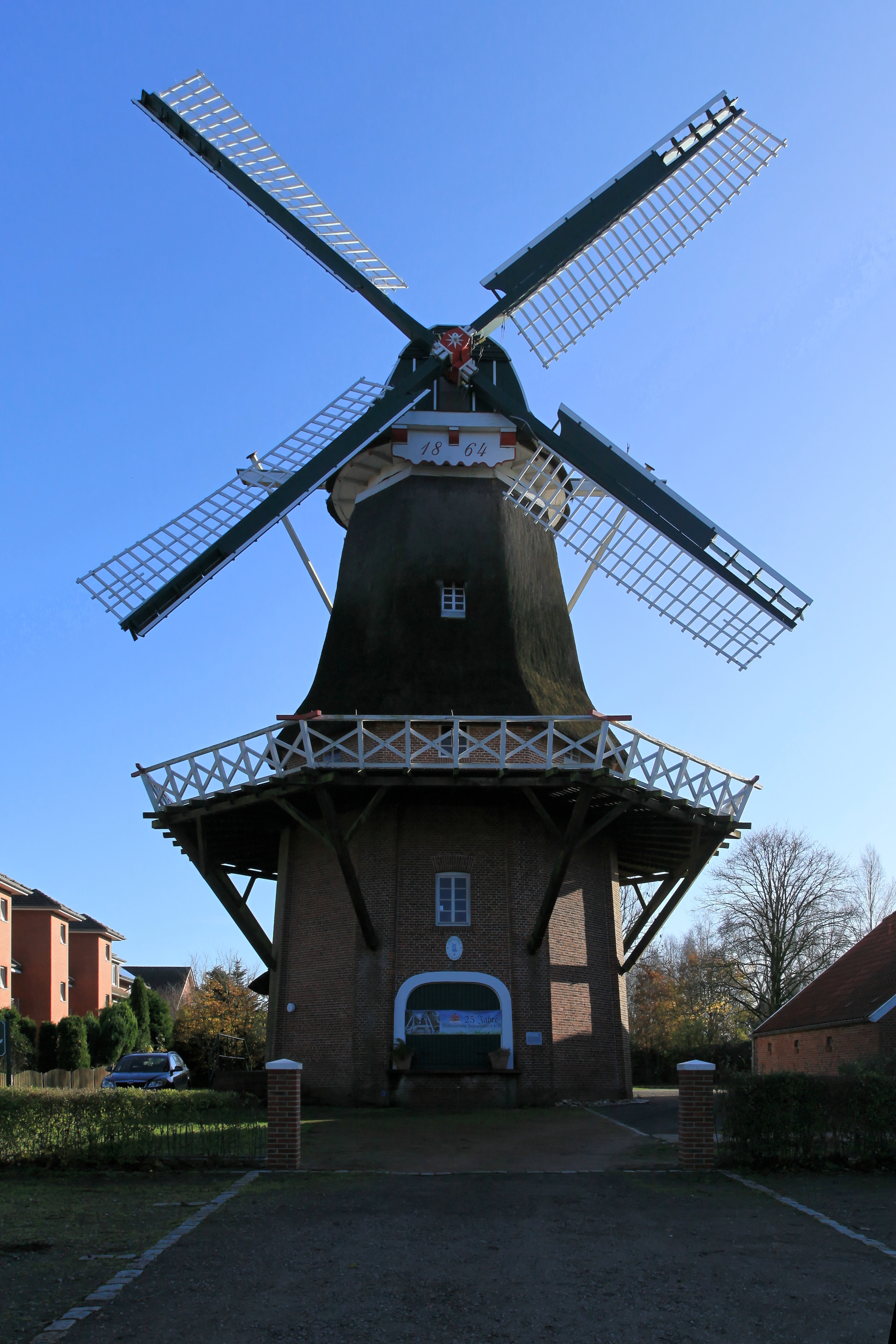 Hahnentanger Mühle, Kultur- und Freizeitstätte Hahnentanger Mühle, Straße 1. Südwieke in Rhauderfehn